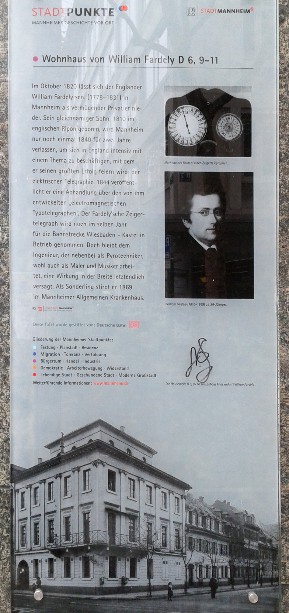 Gedenktafel Wohnhaus von William_Fardely in D6, Mannheim